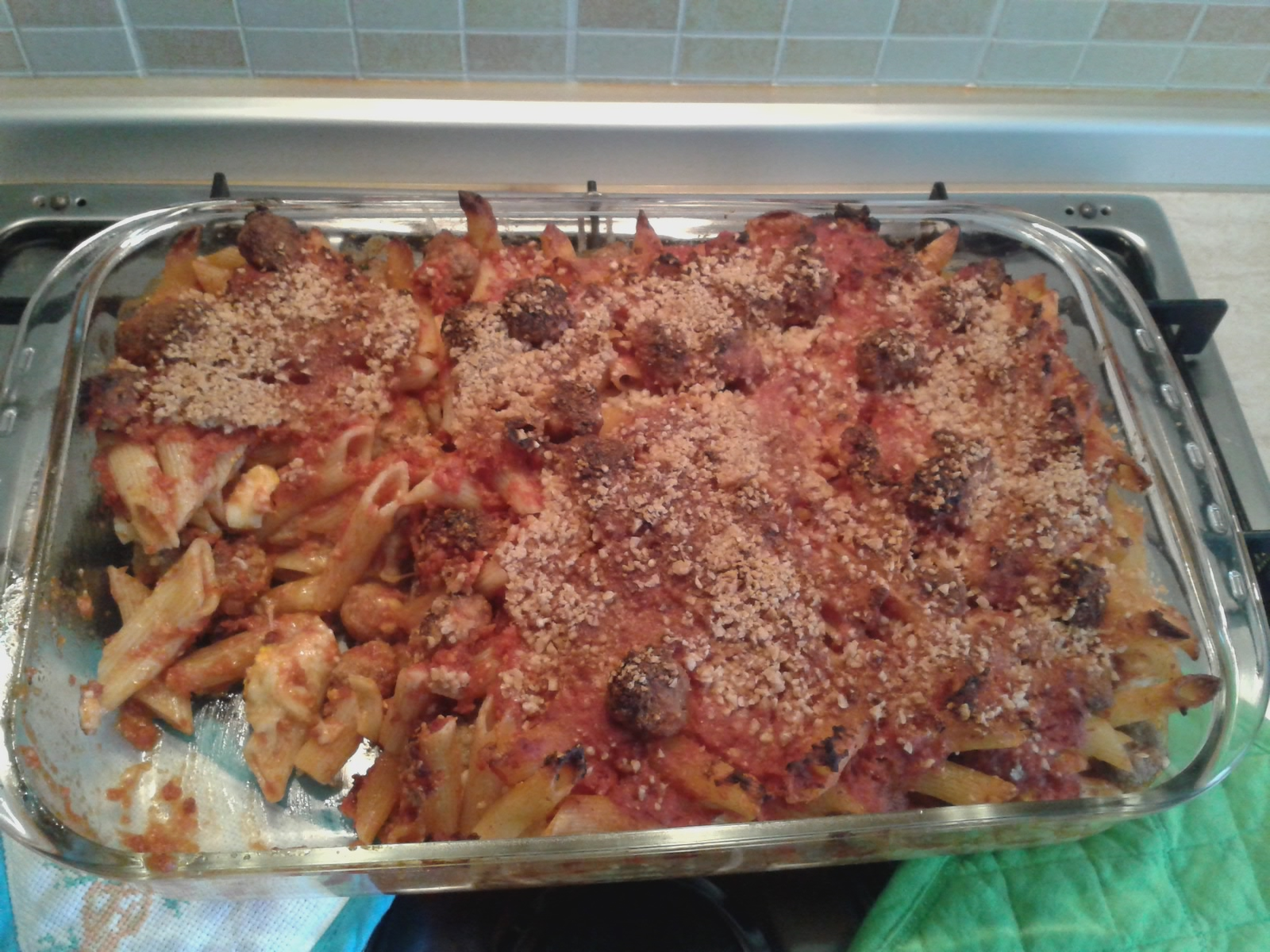 Detta anche pasta china